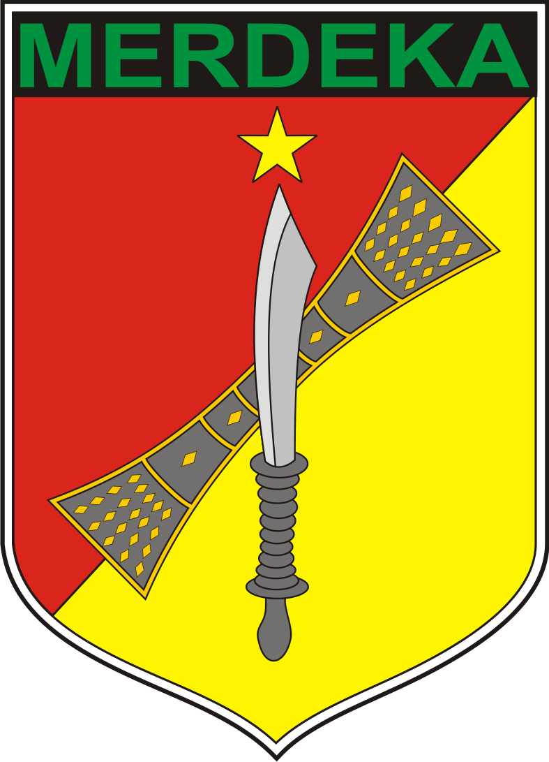 Gambar ini adalah Lambang Kodam XIII/Merdeka